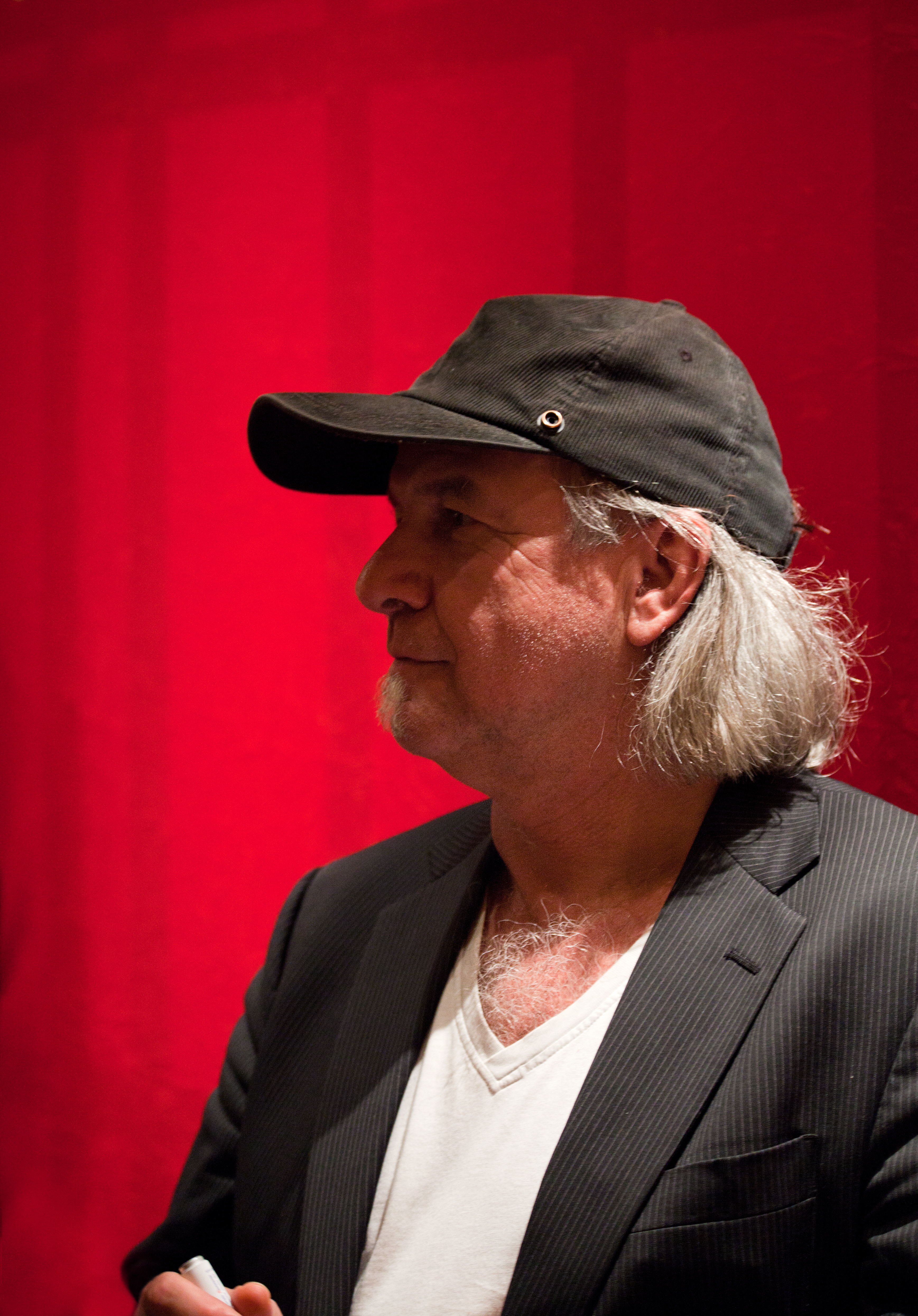 Poträtfoto von Pepe Danquart, deutscher Regisseur und Oscarpreisträger. Im Abaton Kino, Hamburg nach der Vorstellung seines Filmes "Joschka und Herr Fischer".